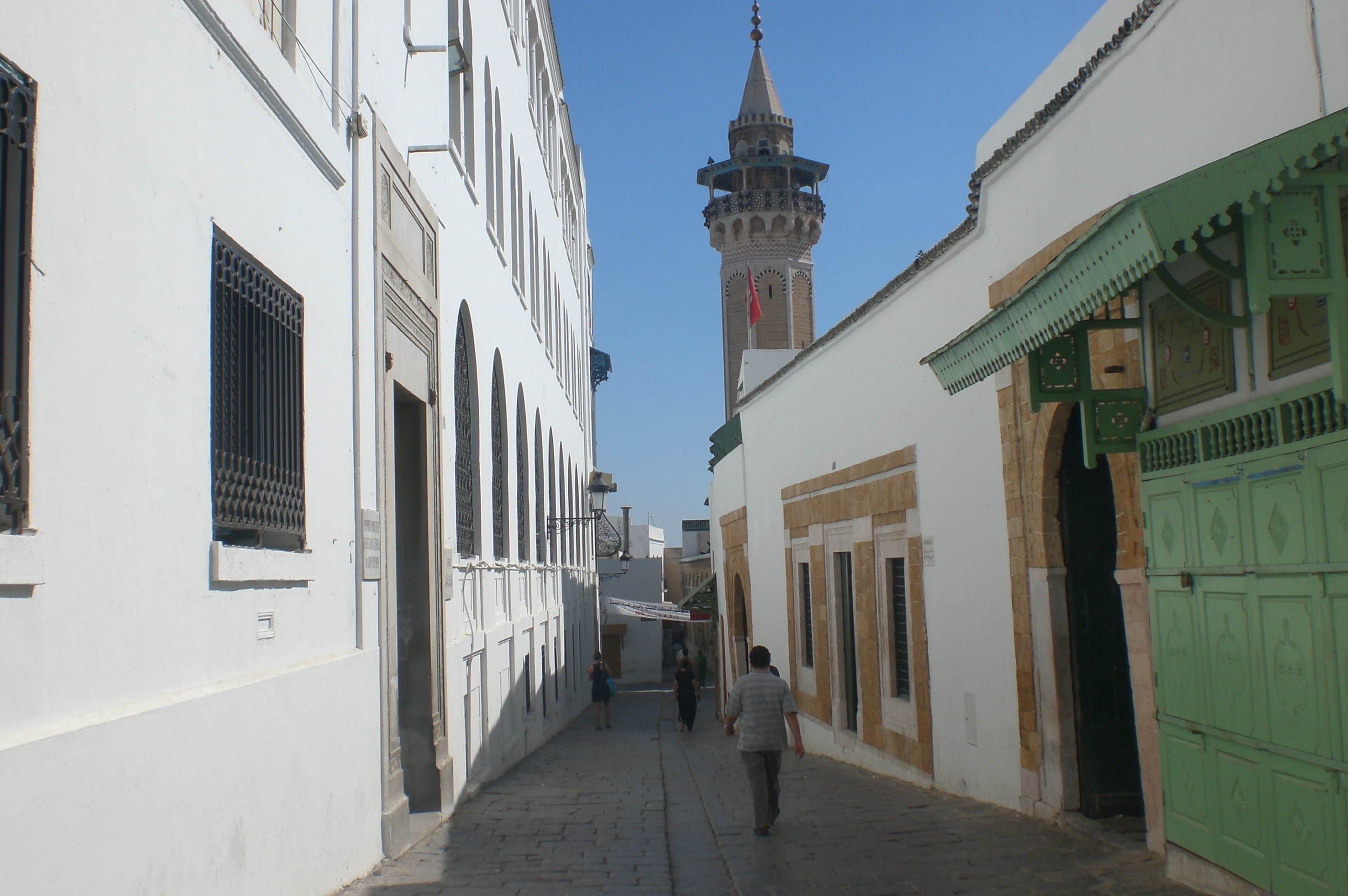 Rue Kasbah-Tunis